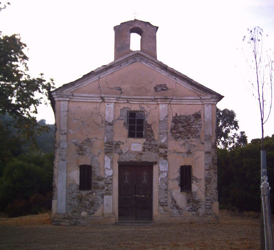 La chapelle San Petru, abandonnée, au bord de la route reliant Pancheraccia à la vallée.